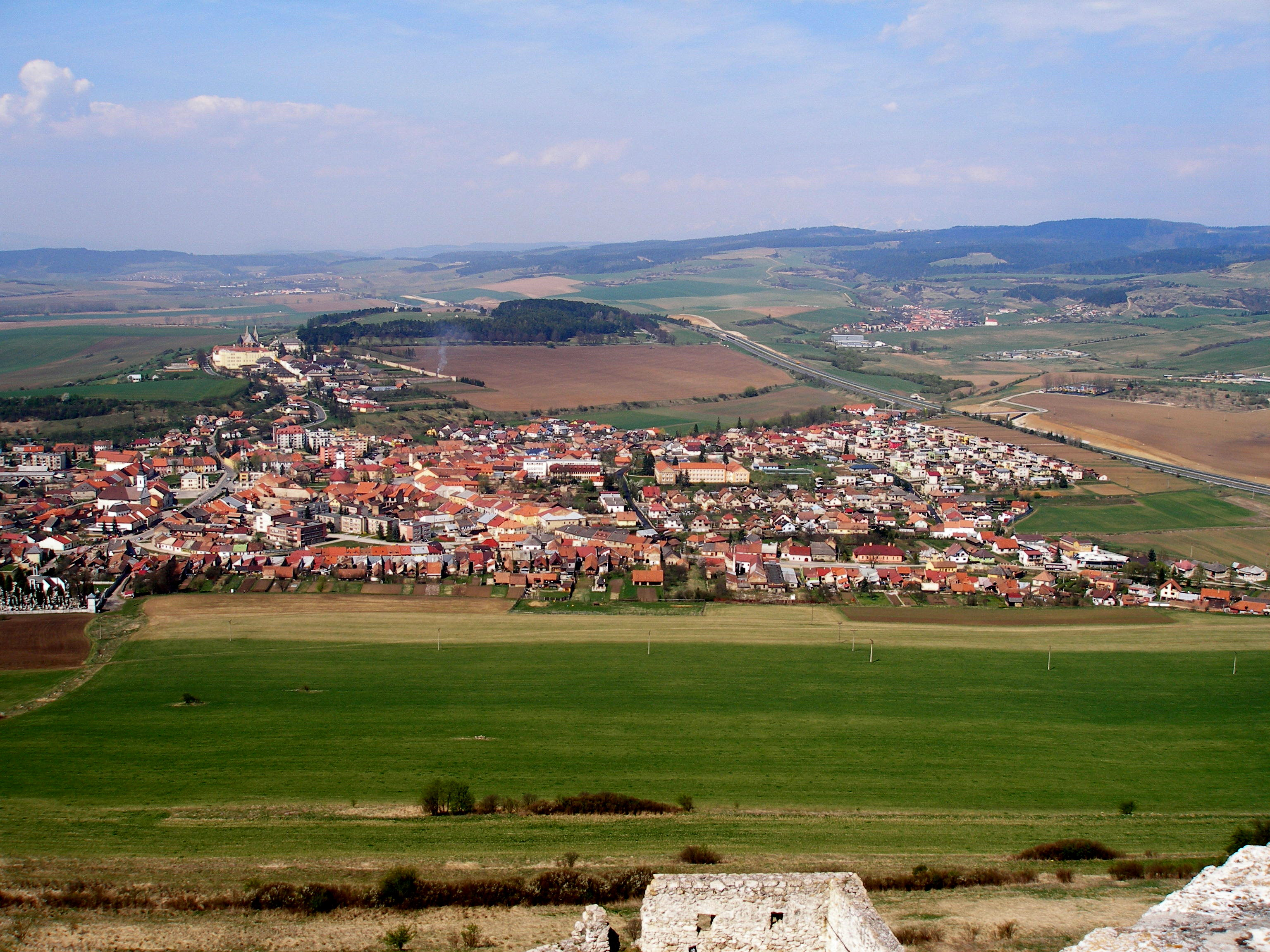 Spišský hrad - národná kultúrna pamiatka. Slovensko